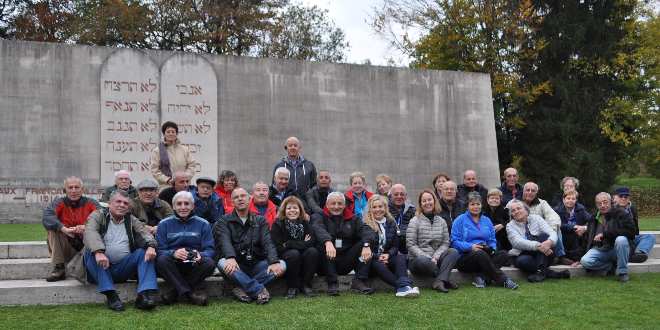 2015 סיור העמותה באזור הנחיתה בנורמנדי